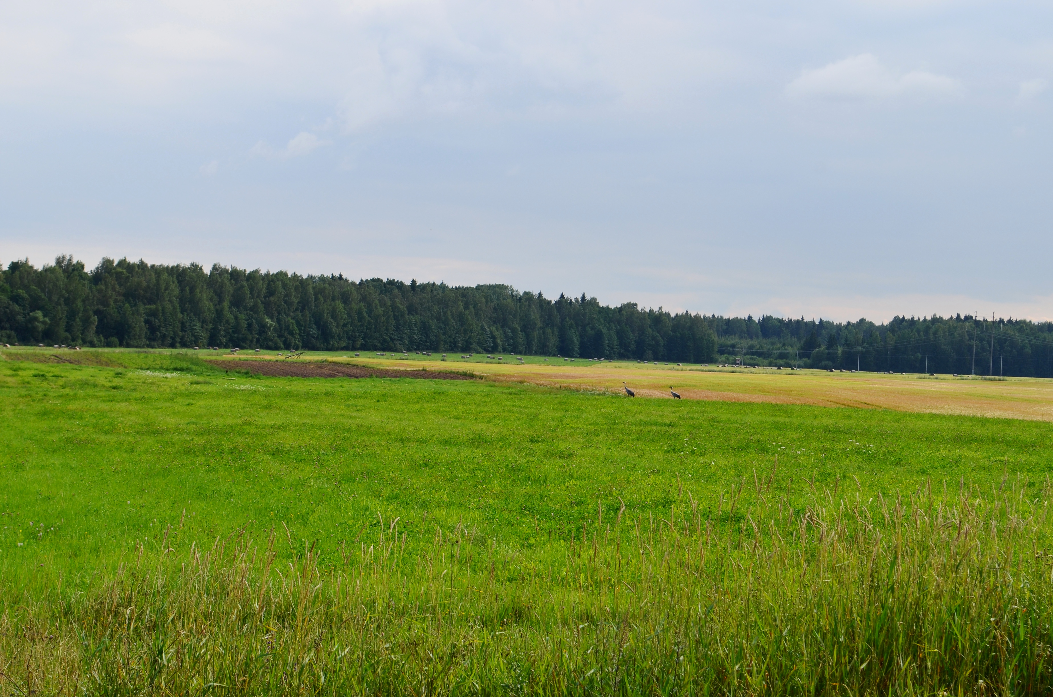 Adutiškio miškai, Didžiasalio sen., Ignalinos raj.